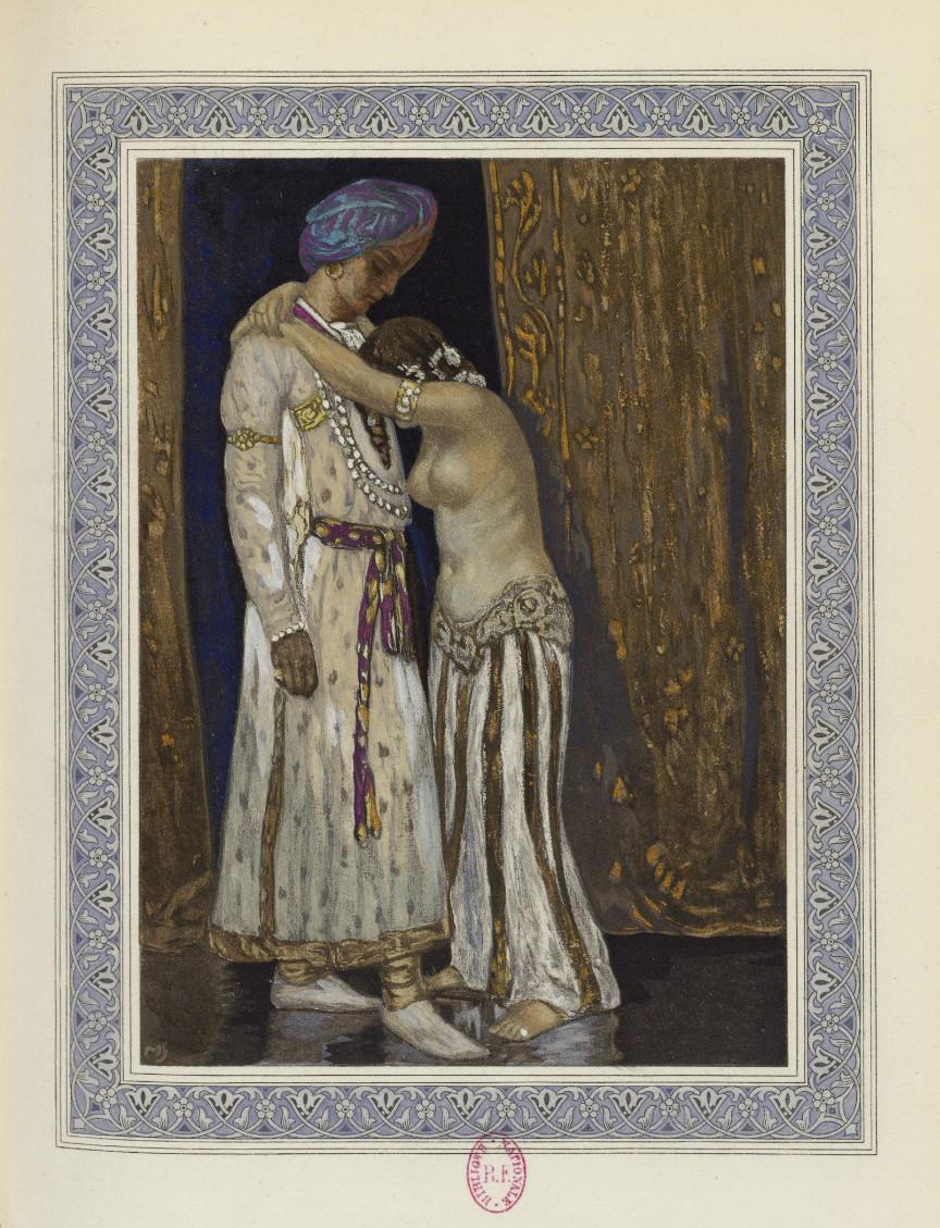 Illustration. Histoire de Minoutchehr : selon le Livre des Rois. Texte d'Abouʼl Kasim Firdousi ; traduction par Jules Mohl ; illustrée par Michel Simonidy. Éditions H. Piazza, Paris.